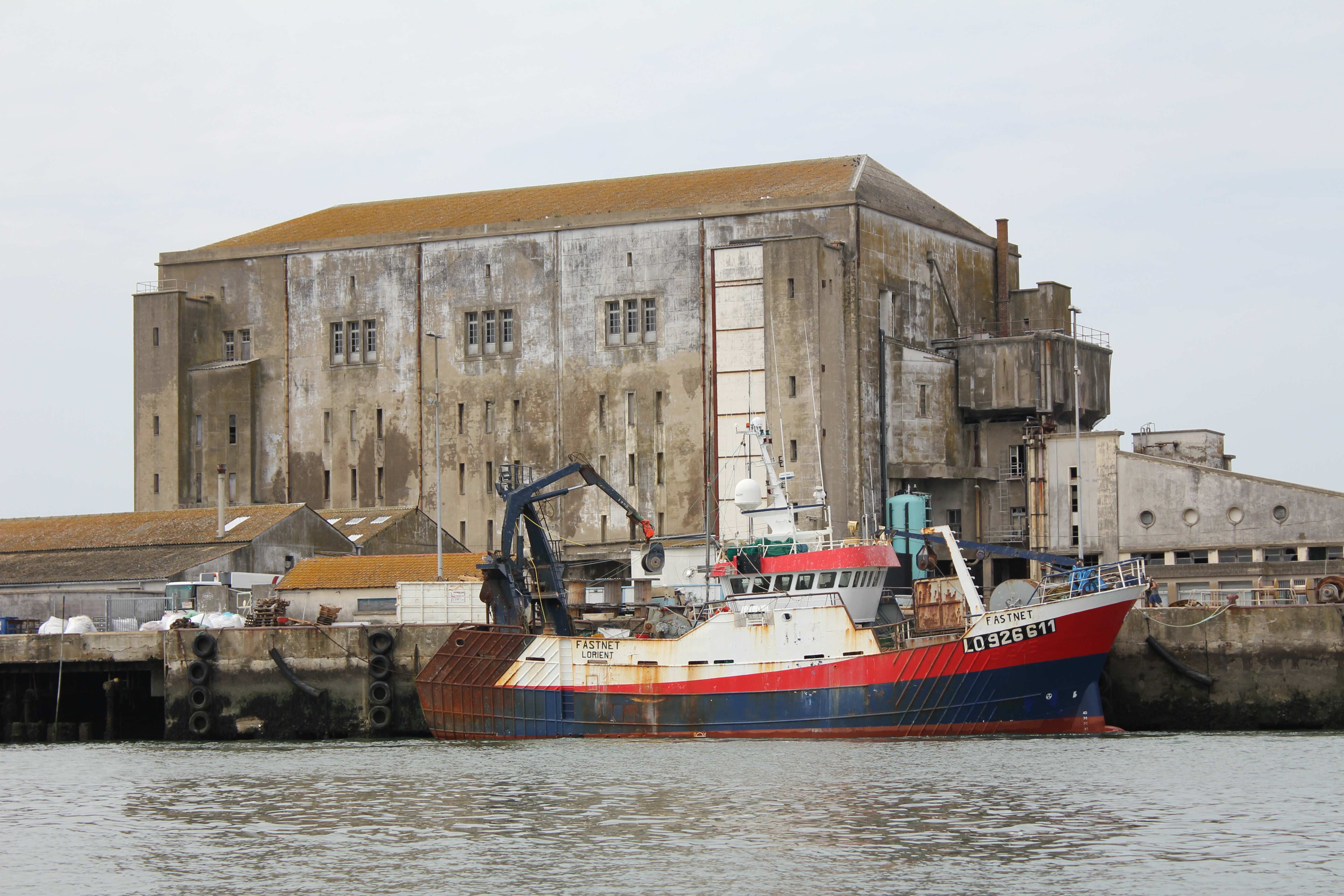 Vue du port de pêche de Keroman à Lorient, France. La glacière est visible derrière les quais.